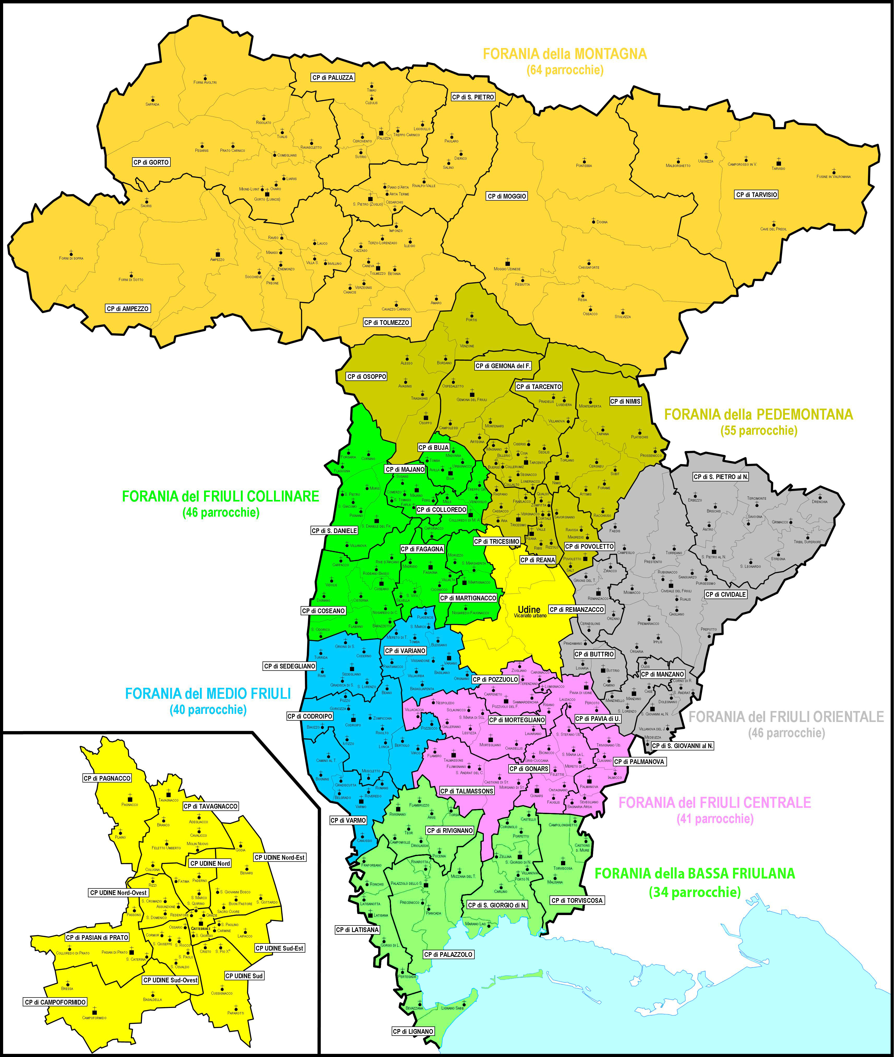 Mappa delle Foranie e delle Collaborazioni Pastorali istituite nel Luglio 2018